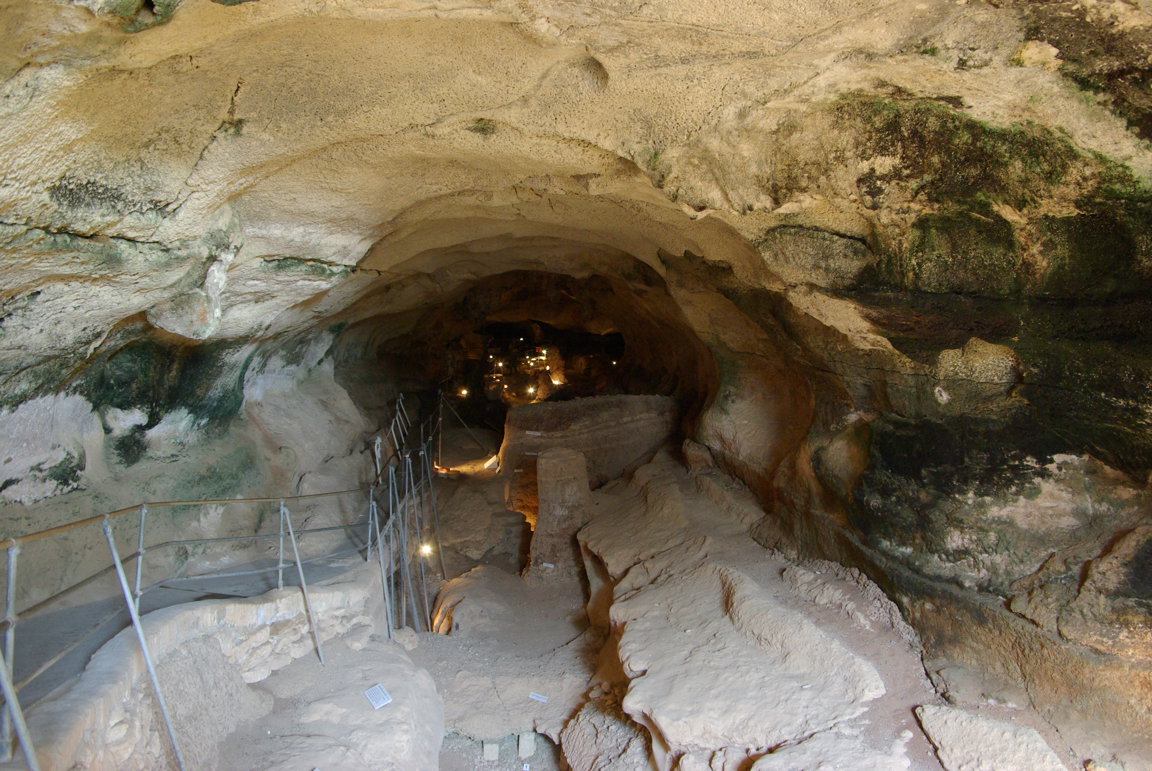 Malta, Ghar Dalam